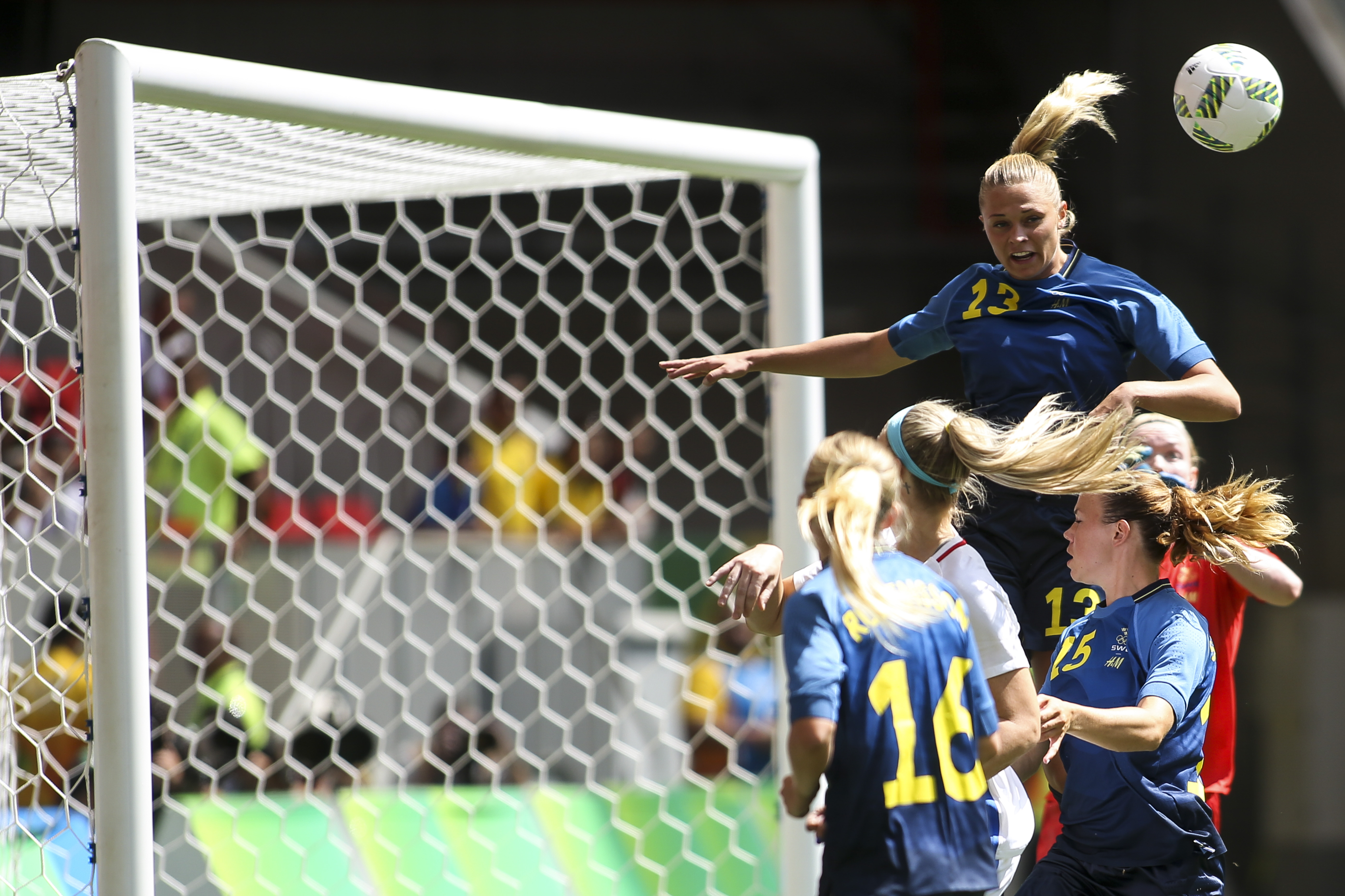 Brasília - A seleção dos Estados Unidos enfrenta a seleção da Suécia pelas quartas de final do futebol feminino, no estádio Mané Garrincha (Marcelo Camargo/Agência Brasil)